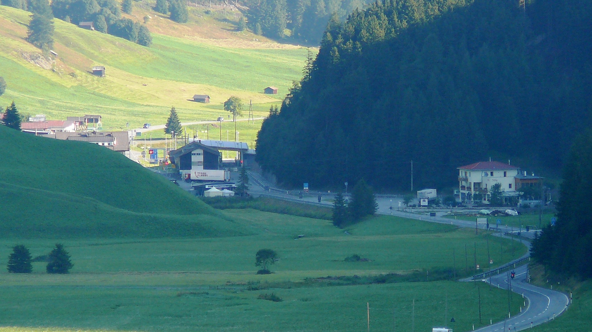 Dogana passo Resia